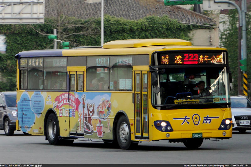 DAEWOO - BC211ML - 286-FP